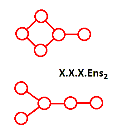 Exemplu de specie pe cardinalitatea concentrată cinci